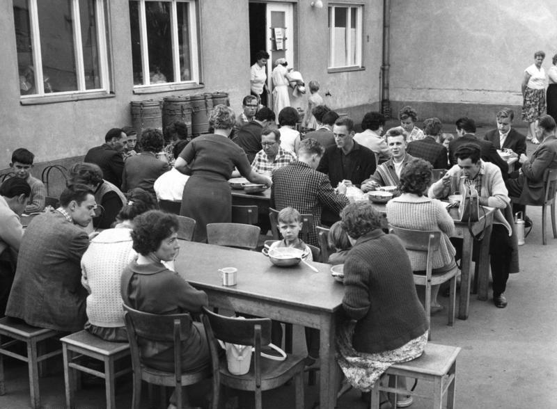 13.7.1961 West-Berlin, Marienfelde Neuer Flüchtlingsstrom